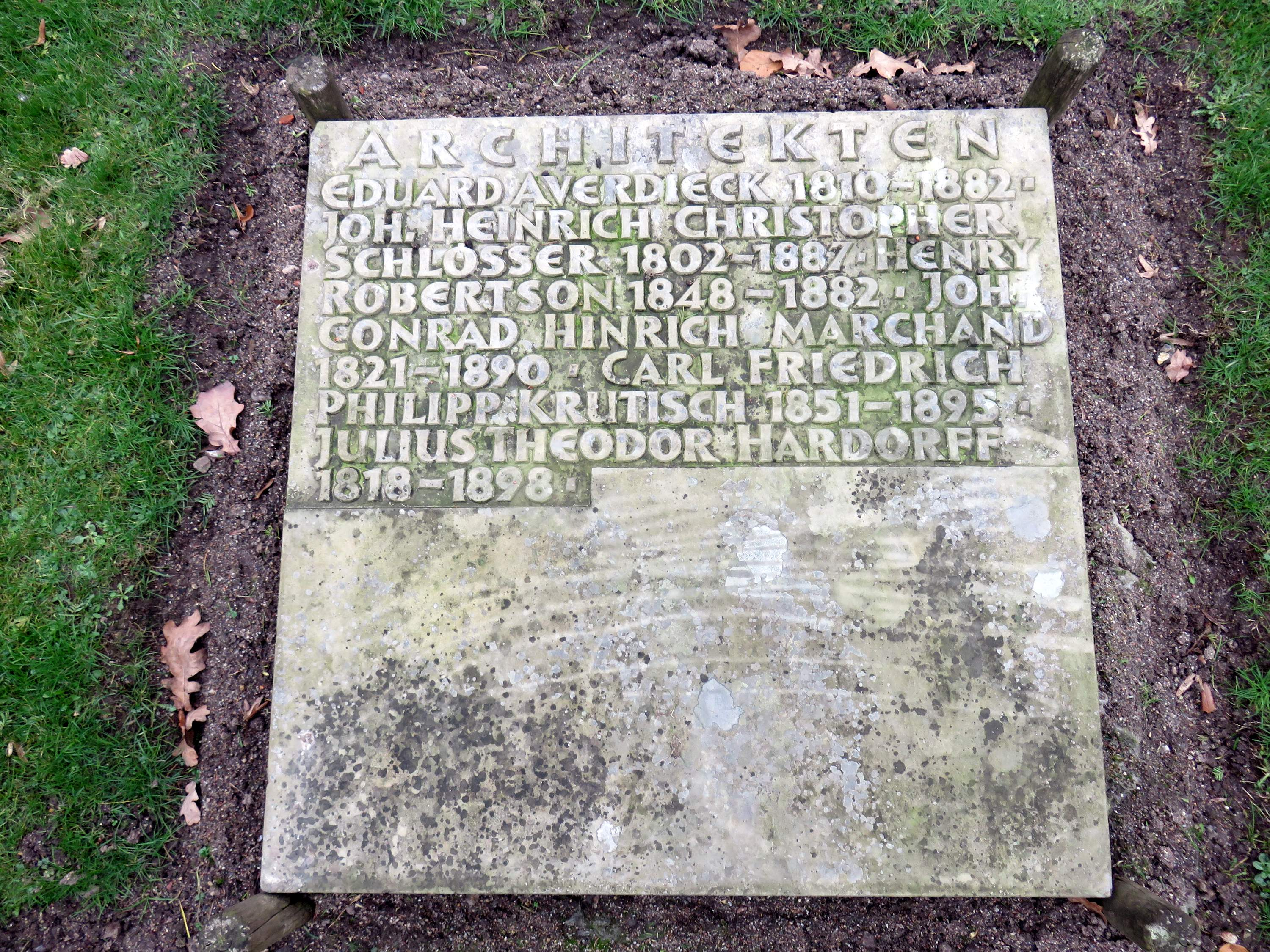 (II.) Sammelgrabmal Architekten im Bereich des Althamburgischen Gedächtnisfriedhofs auf dem Hamburger Friedhof Ohlsdorf (Querachse nordwestliche Seite) zu Ehren von u. a. Eduard Averdieck, Johann Heinrich Christoph Schlösser.